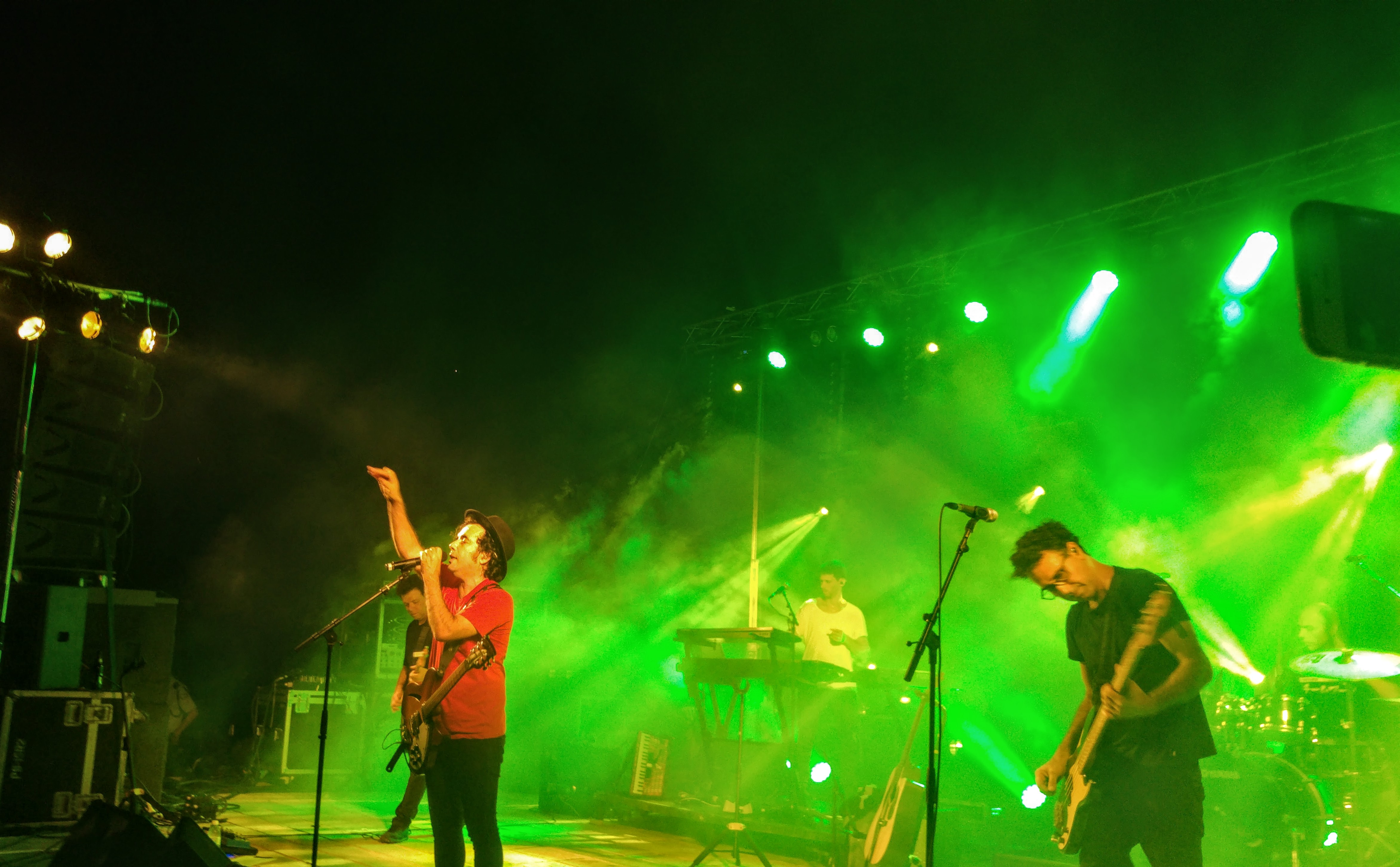 כנסיית השכל במופע בגן הפיסגה ביפו במסגרת לילות יפו, קיץ 2017 יורם חזן: שירה, גיטרה, סקסופון רן אלמליח: גיטרה בס דוד ראסד: גיטרה חשמלית דניאל זייבלט: תופים עמי רייס: קלידים